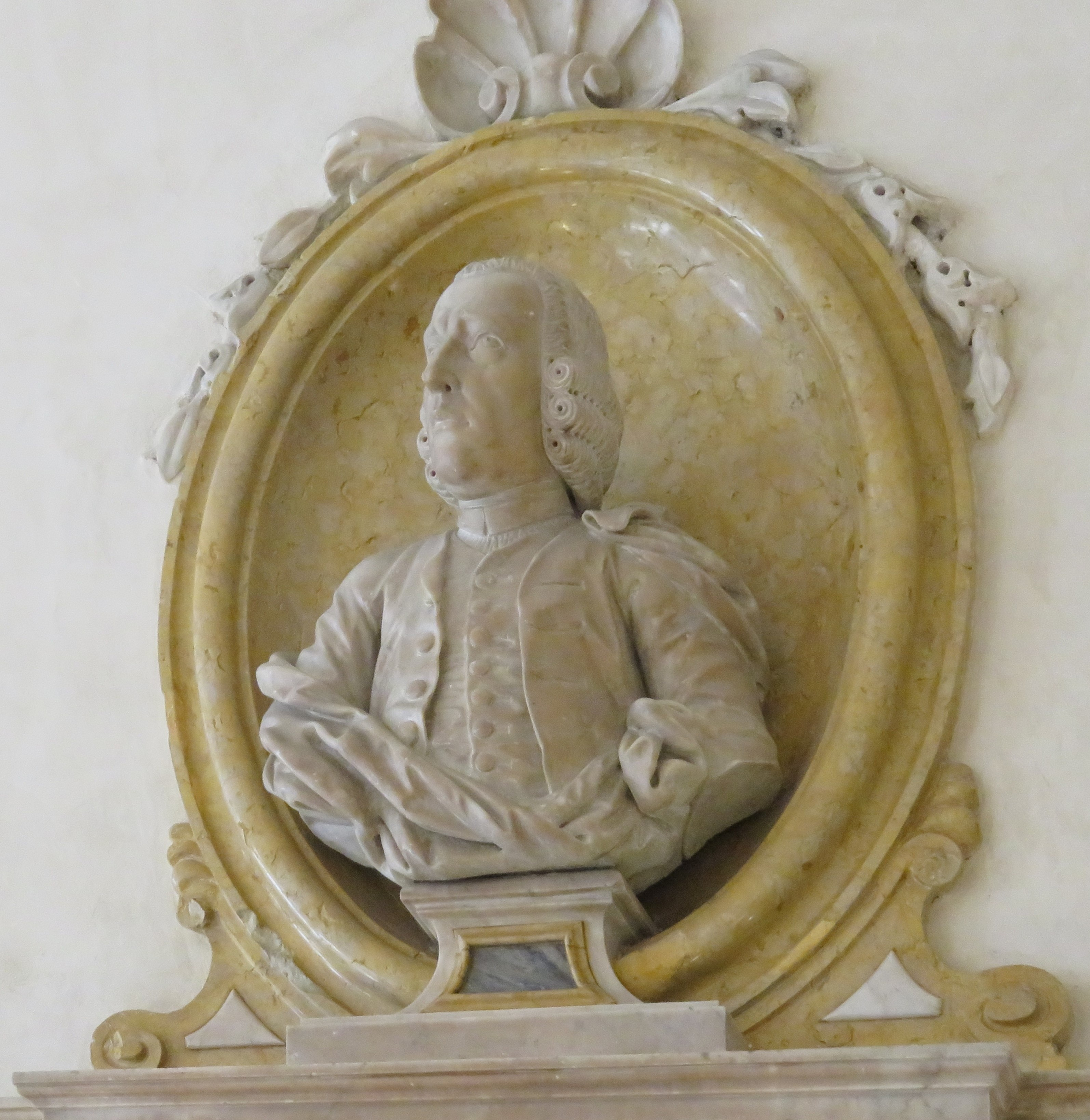 Monumento a Girolamo Tartarotti, opera di Francesco Tomezzoli. Atrio del Palazzo dell’Istruzione (o Palazzo Piomarta) Rovereto